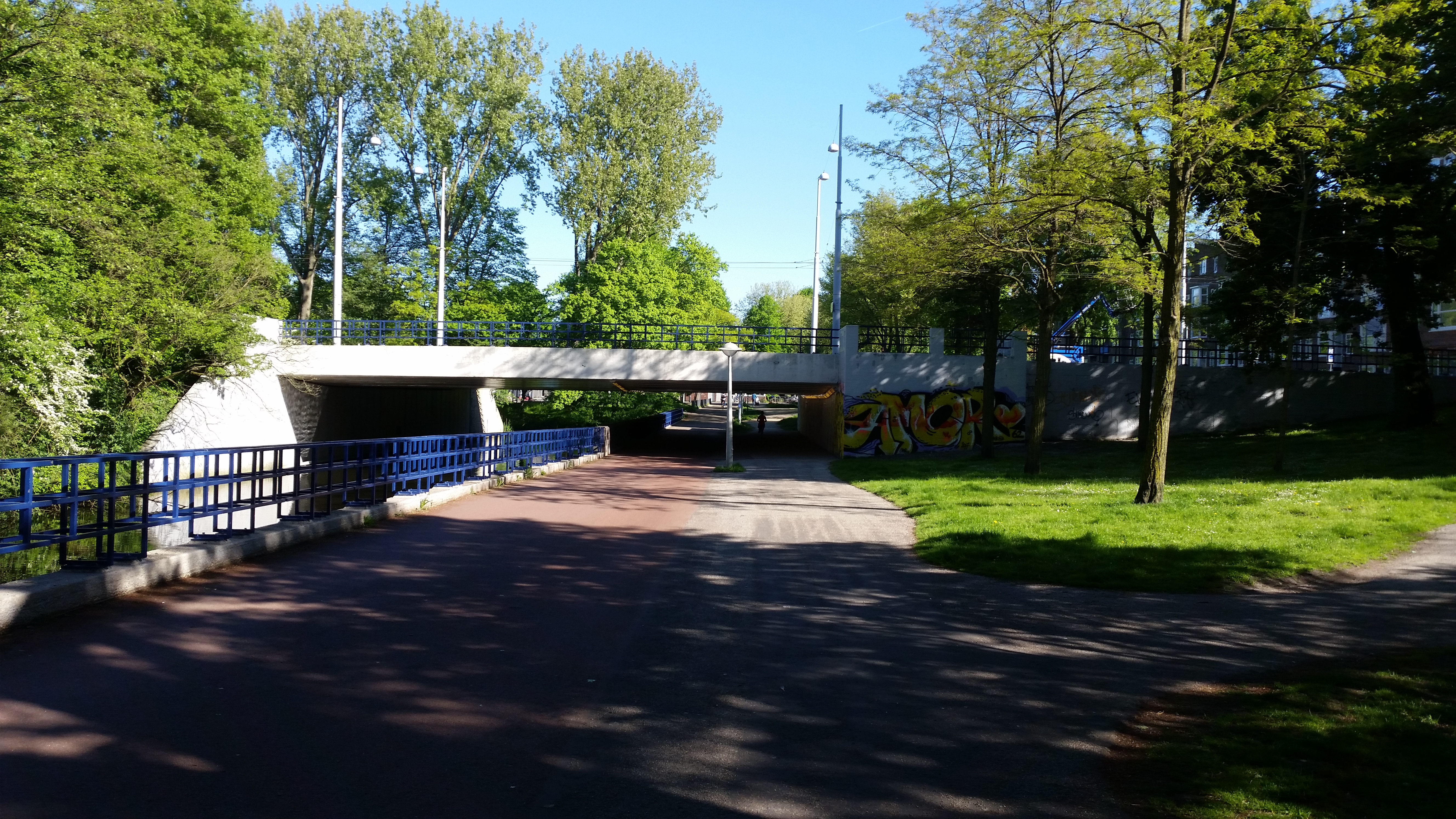 Brug 659, onderdoorgang Jan Evertsenstraat, Amsterdam